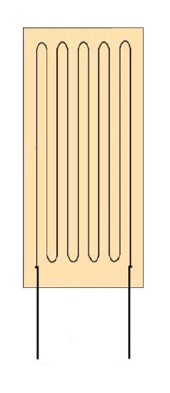 Drátkový odporový tenzometr.